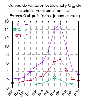 Curvas de variación estacional (5% y 85%) y caudal medio mensual en m3/s en el estero Quilpué despues de junta con esteros. # Dirección General de Aguas # Ministerio de Obras Públicas (Chile) # Evaluación de los recursos hídricos superficiales de la cuenca del río Aconcagua. # Santiago de Chile # Ministerio de Obras Públicas (Chile) # enero 2004 # url = # ANEXO 2, CURVAS DE VARIACION ESTACIONAL DE CAUDALES, pág 6, mes 5% 85% qm abr 2.47 0.94 1.53 may 2.26 1.00 1.49 jun 2.64 1.04 1.66 jul 3.95 1.03 2.02 ago 5.37 1.13 2.65 sep 6.22 1.24 2.91 oct 8.90 1.81 4.19 nov 14.15 2.59 6.43 dic 15.28 1.98 6.88 ene 9.65 1.34 4.34 feb 4.58 1.14 2.32 mar 3.30 1.02 1.82